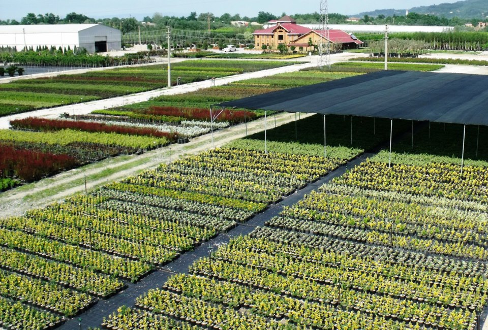 Fotoğrafların kaynak gösterilmeden, izin alınmadan kopyalanması ve kullanılması 5846 sayılı Fikir ve Sanat Eserleri Yasasına göre suçtur.Fotoğrafların tüm hakları ve sorumluluğu Ümit AYGÜN 'e aittir. Mission Aynı anda dört mevsimin yaşandığı ülkemiz, her bölgesinin farklı toprak yapısı, klimatolojik özellikleri vb. doğal etmenler yönünden şartların en elverişli olduğu ülkelerdendir.Bu elverişli şartları kullanarak fidan üretiminde dünya standartlarını yakalamaktır. Company Overview Şirketin kuruluş amacı, Grup firmalarından Sakarya Fidancılık Seracılık San. Tic. A.Ş.’nin 120 hektar alanda üretimini yaptığı bitkileri yarı mamul halde olarak bitki tür ve cinslerine göre uygun kaplarda mamul hale getirmek olup, öncelikle Marmara Grup firmalarının bitki ihtiyacını karşılamak, yurtiçi ve yurtdışına pazarlamaktır. Bu maksatla şirket bünyesinde 5.000 m2 kapalı alan bitki saksılama hangarı ve otomatik sulama sistemleri ile bitki sağlığının gerektirdiği her türlü donanım bulunmaktadır. Description İşletme bünyesindeki yurtiçi ve yurtdışı proje ve peyzaj uygulamaları yapan Sakarya Botanik San. ve Tic. A.Ş. hali hazırda Orta Asya, Orta Doğu ve Kafkas Cumhuriyetlerinde kapsamlı ihracat yapmakta olup aynı zamanda peyzaj uygulamaları da yapmaktadır.